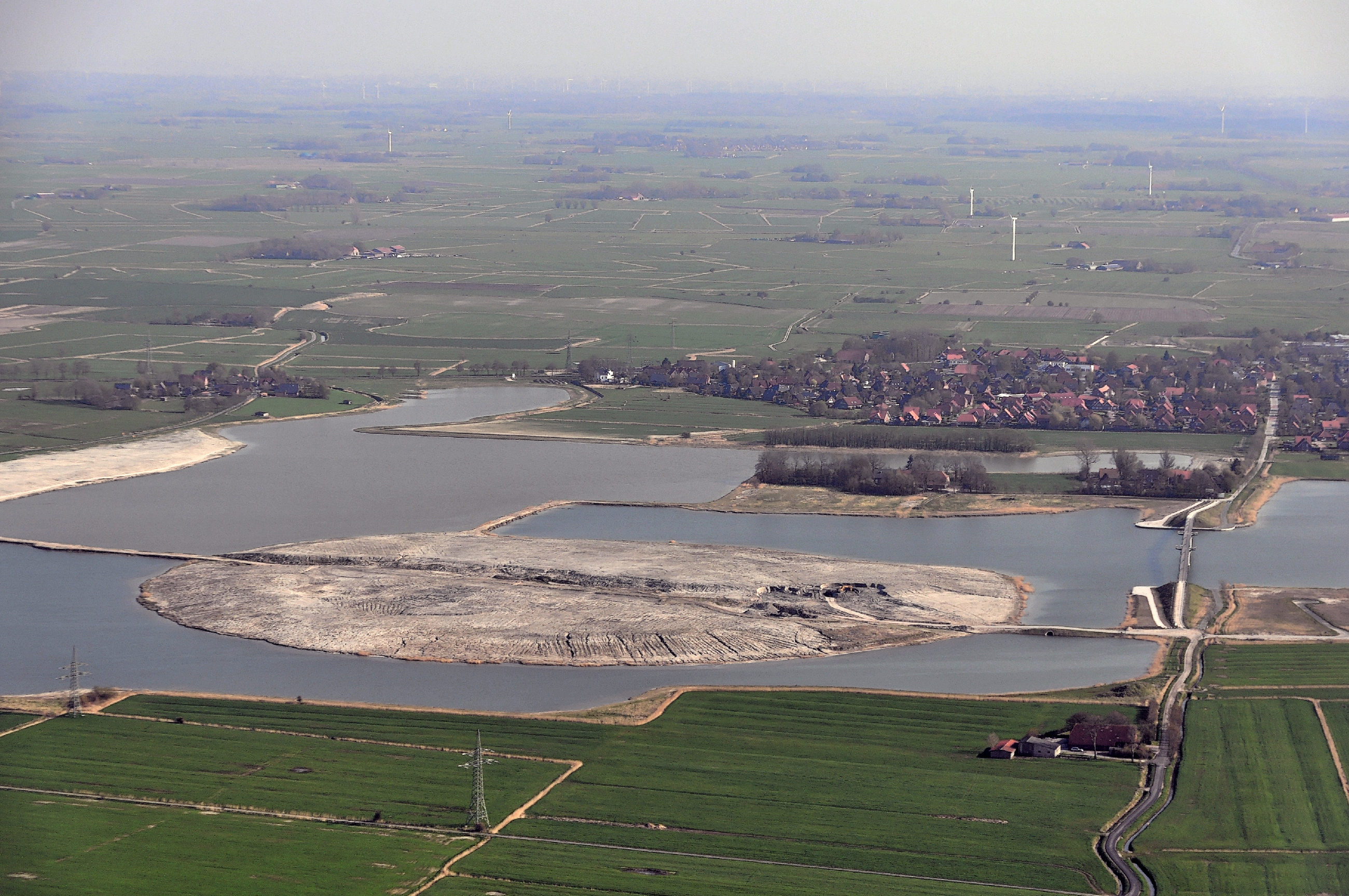 Luftbilder von der Nordseeküste 2013-05: Wangermeer